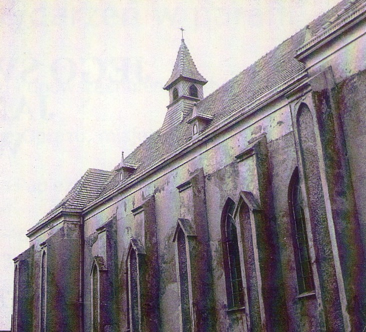 Zachodnia elewacja kościoła